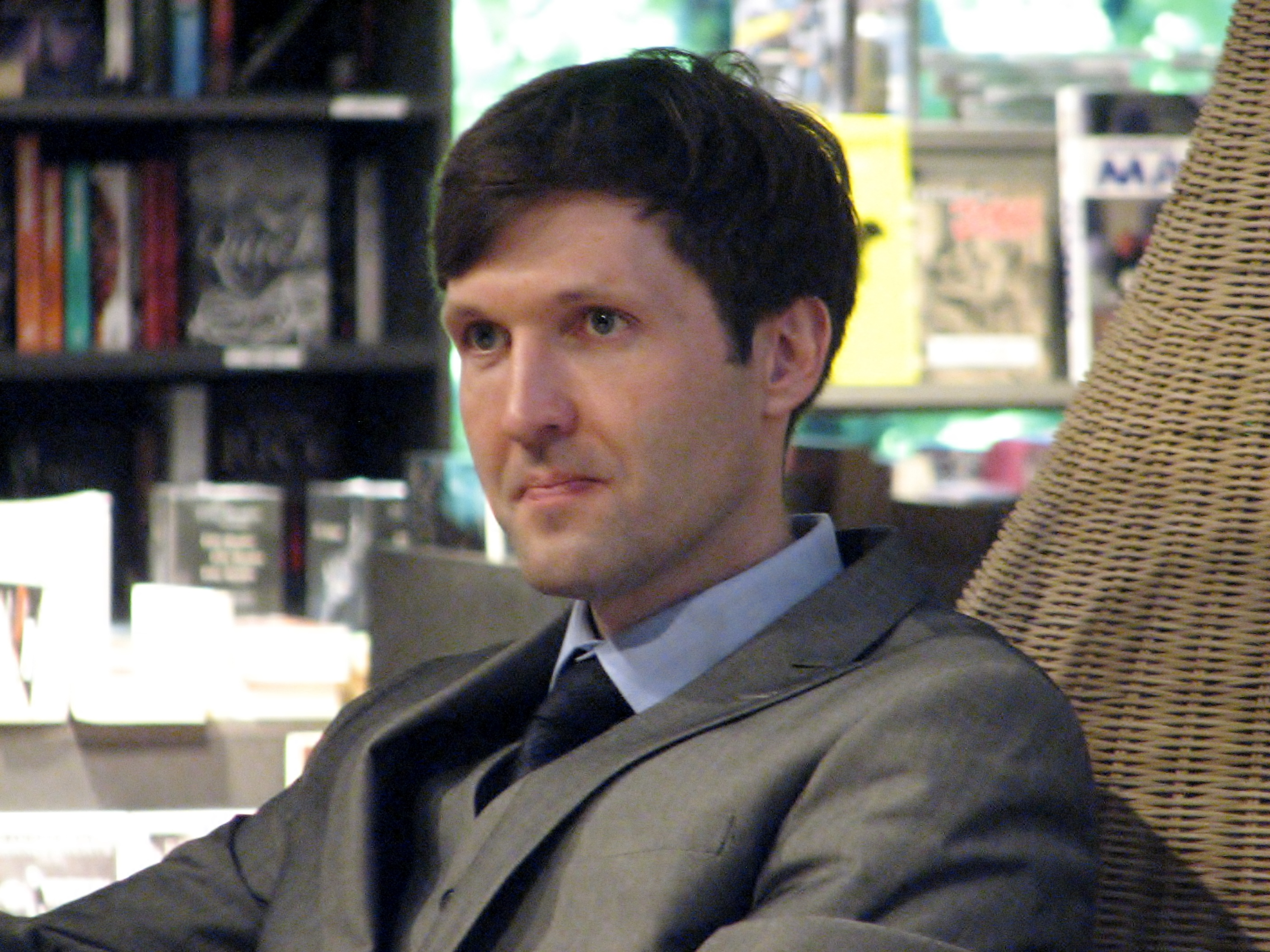 Martin Helme Mart Helme raamatu "Poliitikast ja sõjast" esitlusel Solarise keskuse Apollos